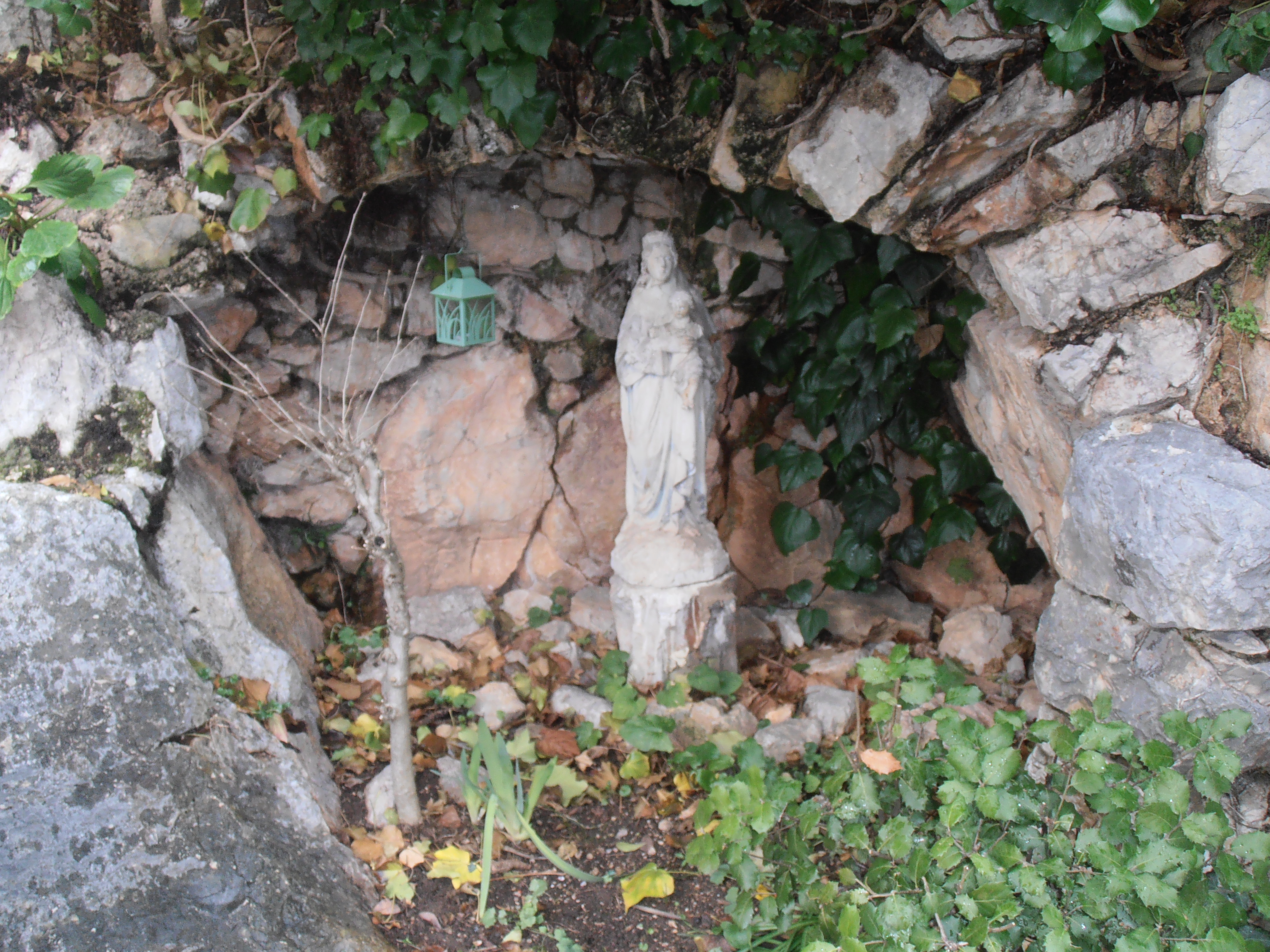 Var, Ampus, Grotte érigée en ex-voto avec la statue de la Vierge, devant le presbytère au 9 rue rompe-cul, sur le "chemin de l'eau" Réalisation de l'Abbé Adonis Volpato, qui restaura l'église d'Ampus et d'autres églises du voisinage. Il participa avec Jeoff Hindry à la création du Chemin de Croix à l'emplacement de l'ancien château fort, don de la famille de Jerphanion